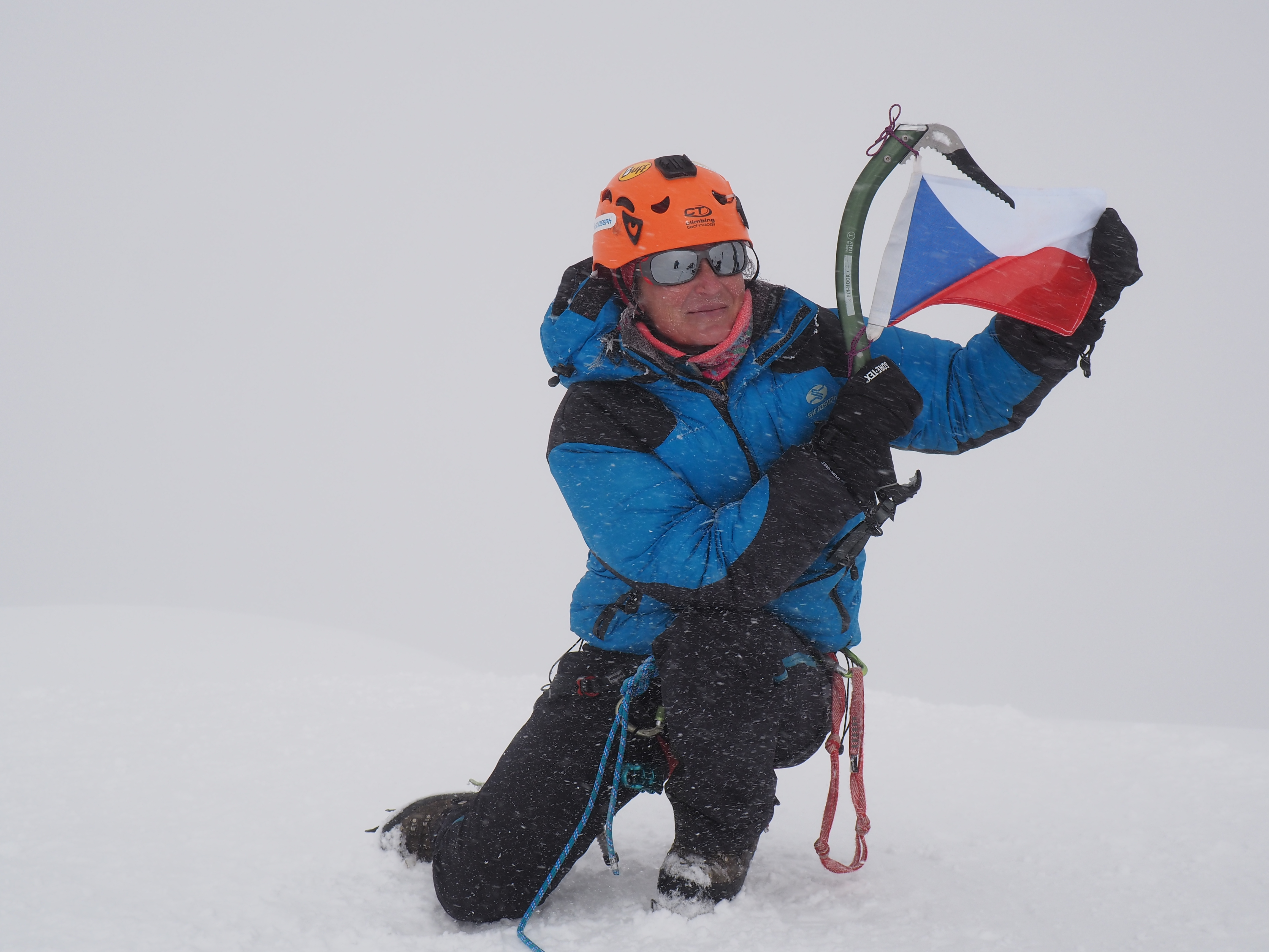 Markéta Hanáková, Nevado Pisco 5762 m